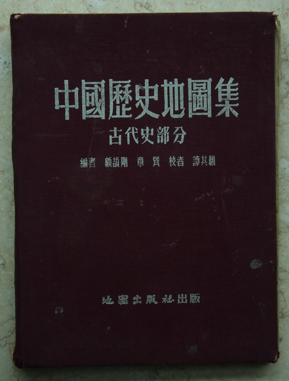 由顧頡剛和章巽共同編寫的，出版於1955年的《中國歷史地圖集（古代史部分）》.